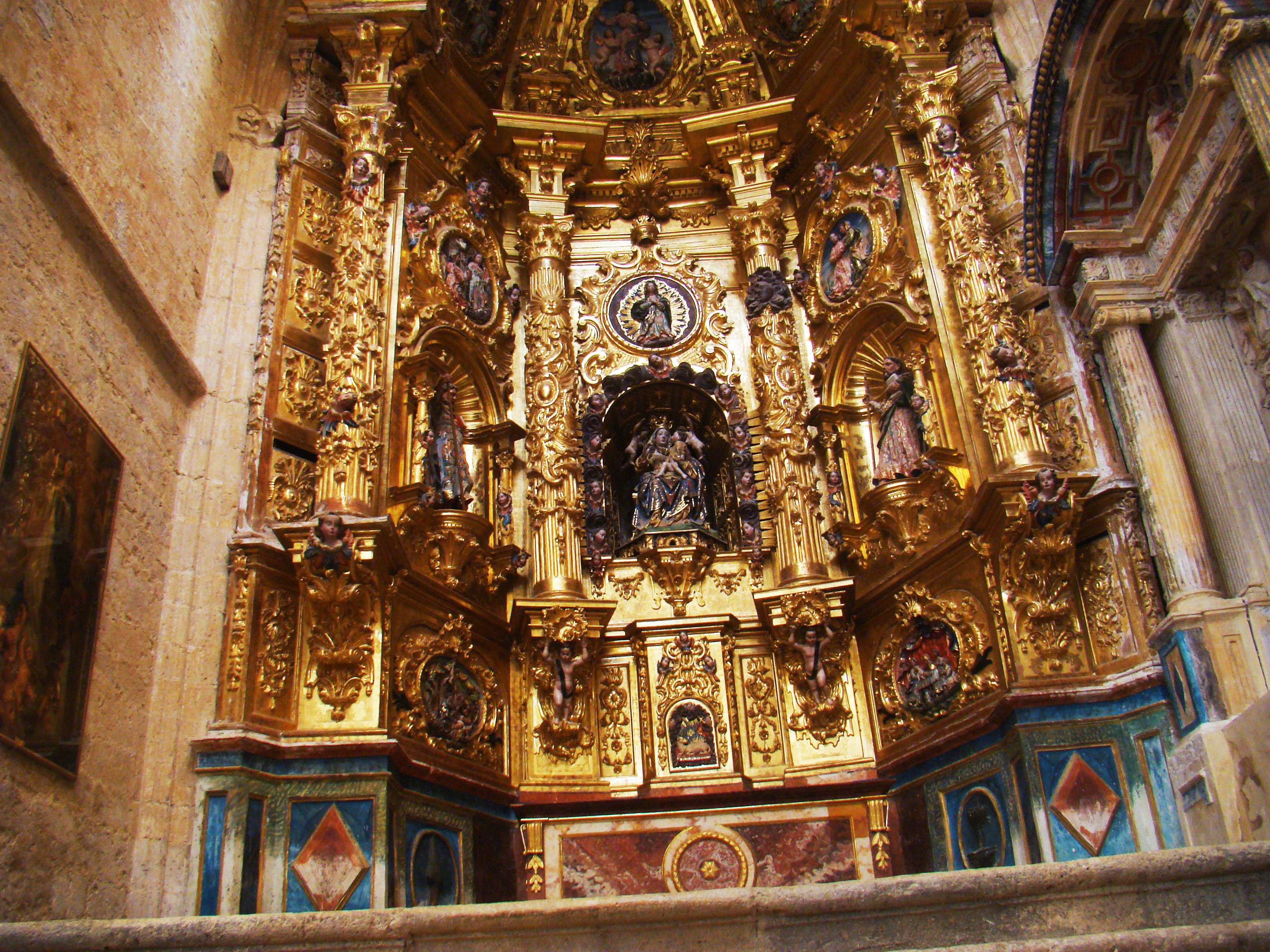 Iglesia de San Hipólito en Támara de Campos (Palencia, España). Retablo de la Virgen del Populo, barroco e 1757. Obra de Francisco Tejedor, dorado por José Benito Bravo.